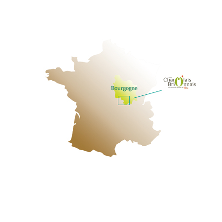 situation en France